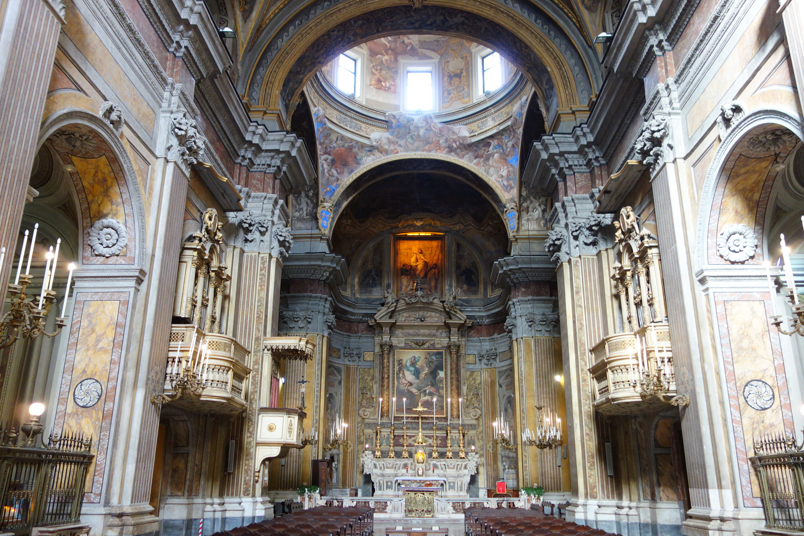 Orgel San Ferdinando, Neapel, Italien